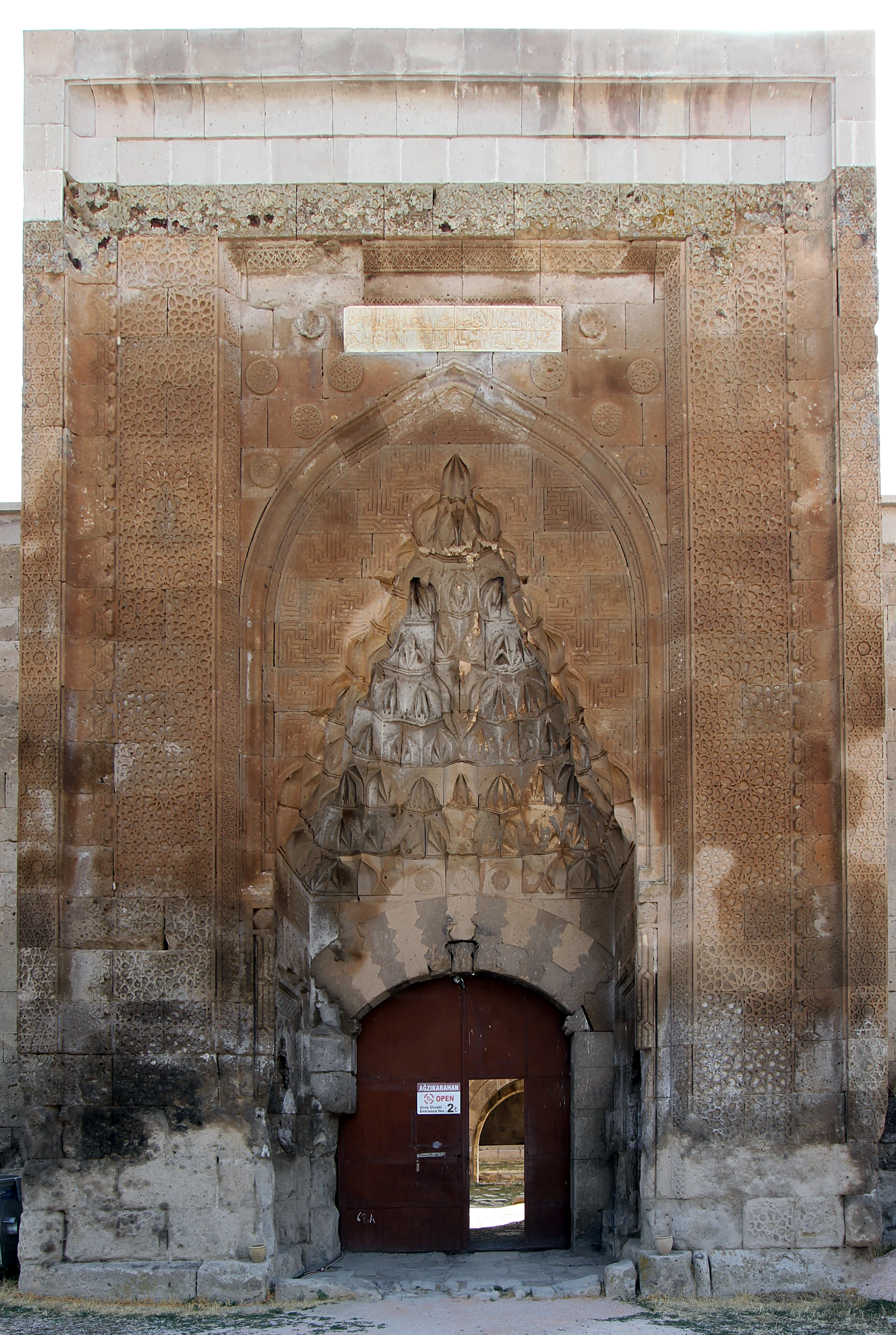 Ağzıkarahan, seldschukische Karawanserei nahe Aksaray, Türkei, Eingang